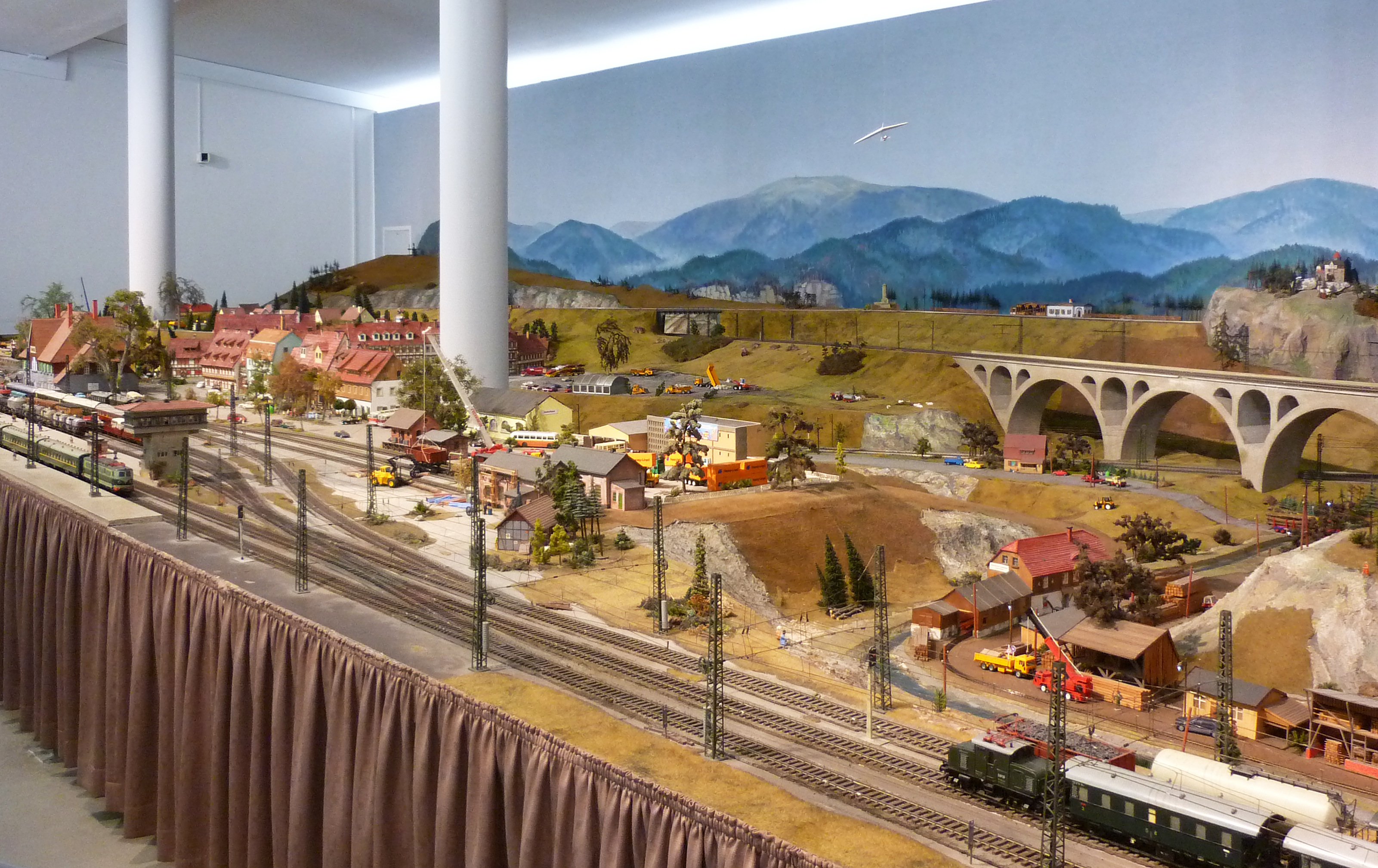 Verkehrsmuseum Dresden: Modellbahnanlage